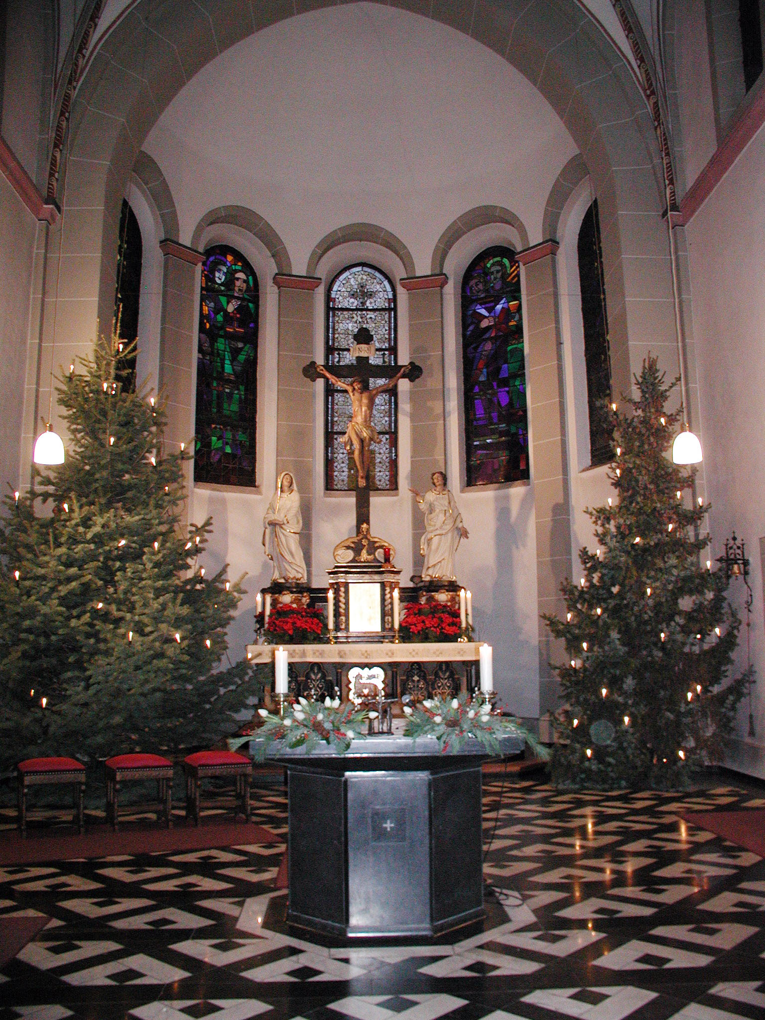 Alt Hürth Sankt Katharina